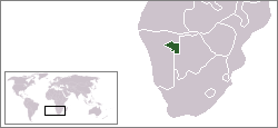 Description:Carte de localisation du bantoustan du Hereroland, Namibie Auteur:Rémih